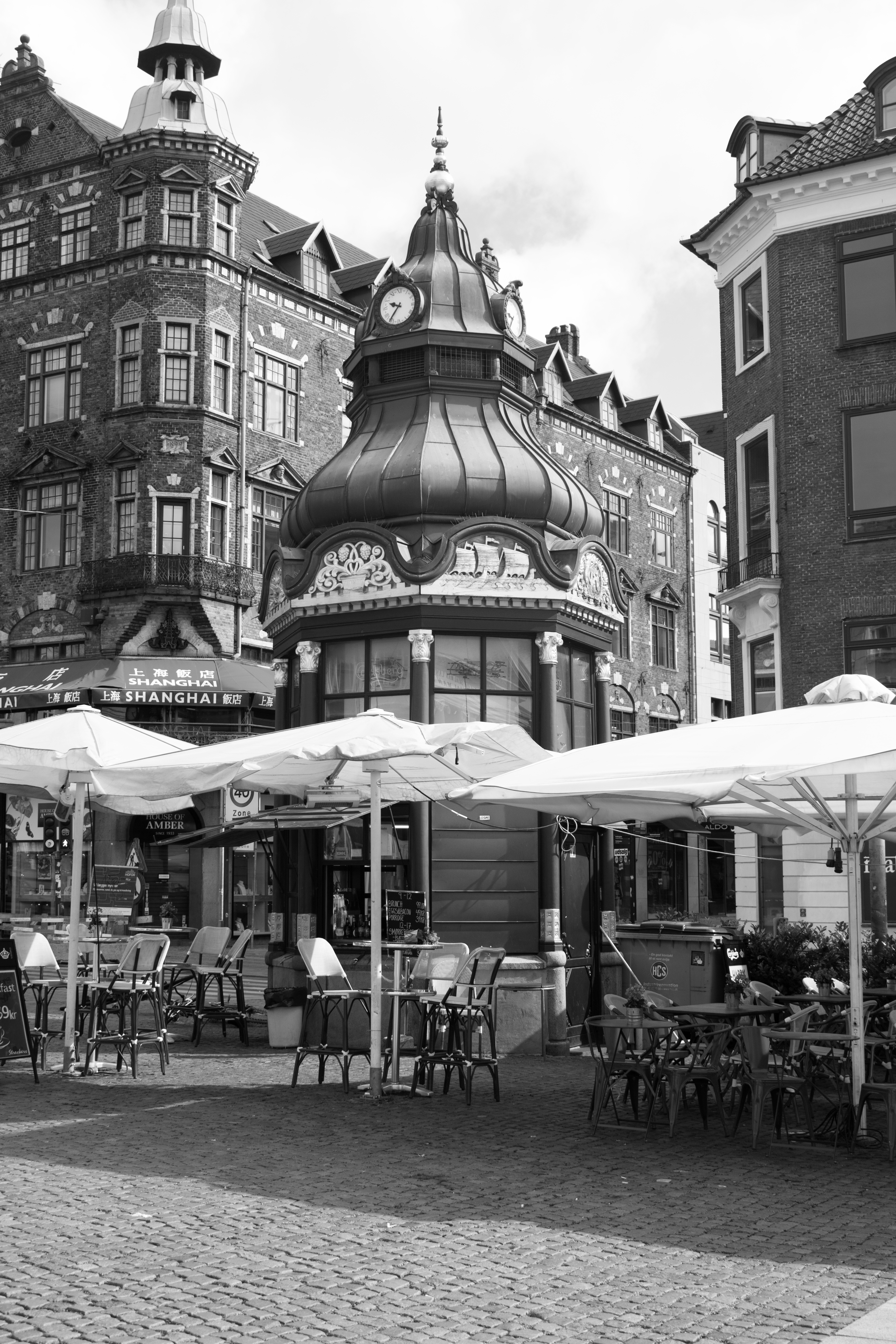 Old kiosk on Nytorv in Copenhagen, Denmark